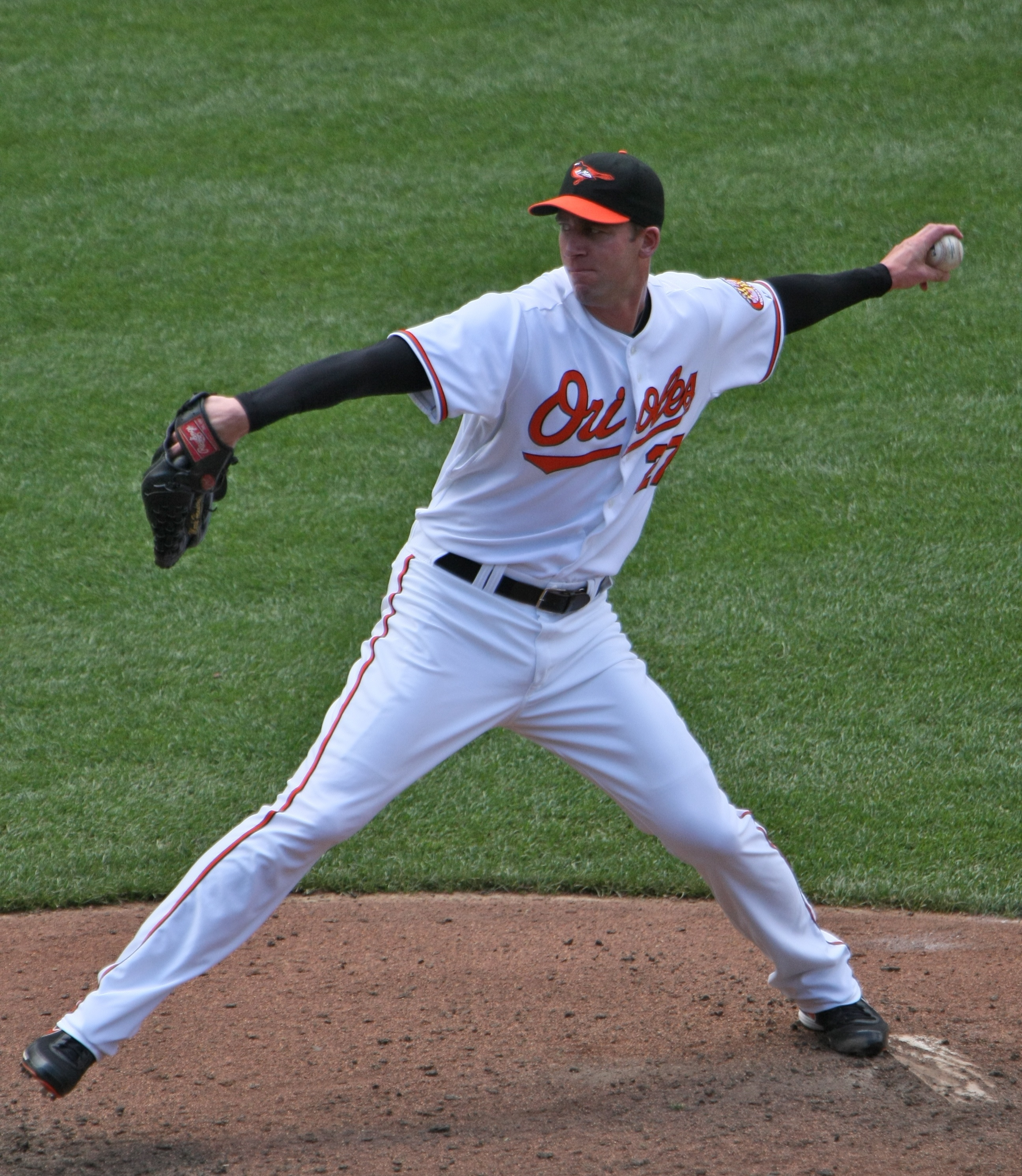 Mark Hendrickson